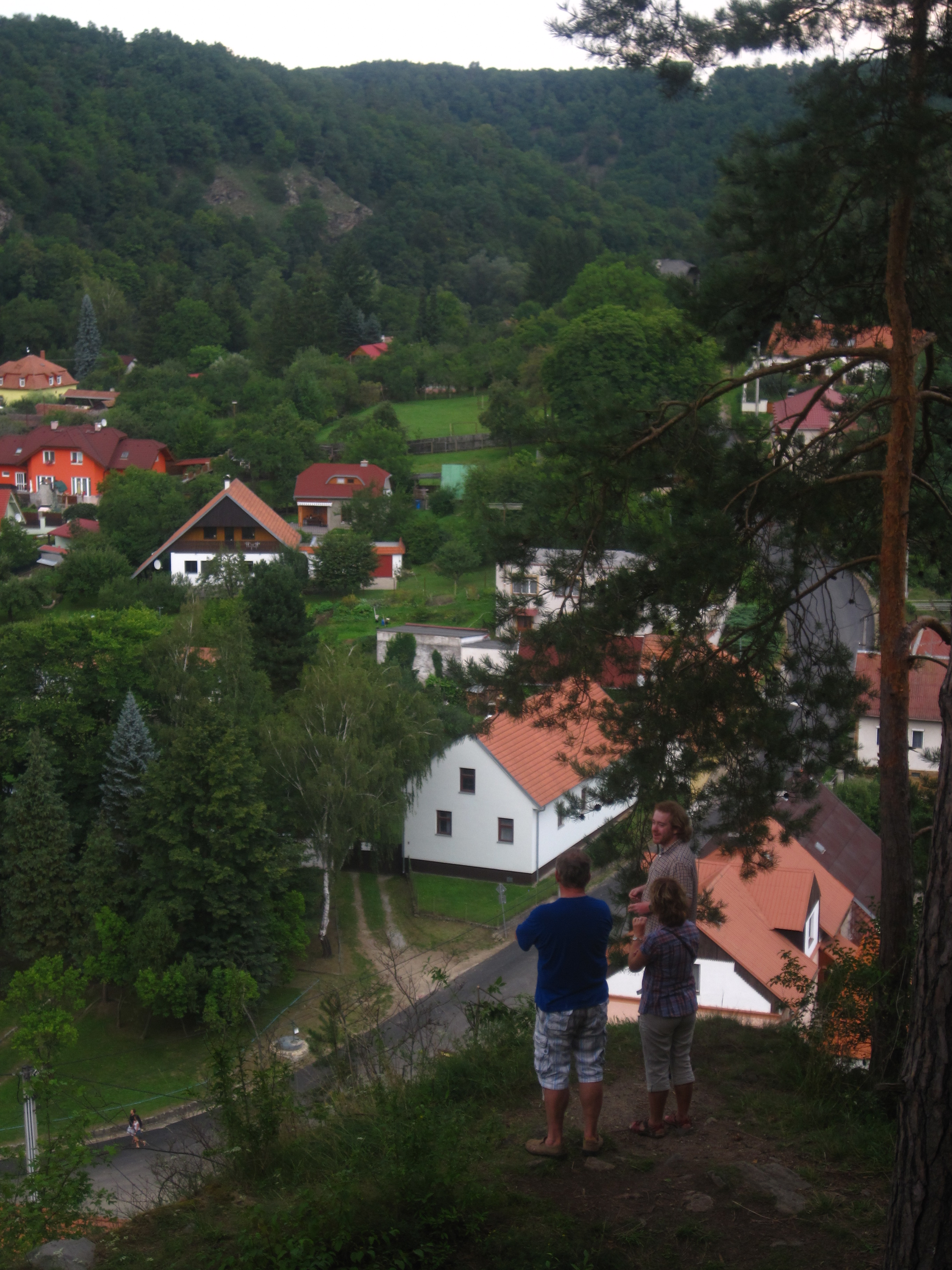 Frejštejn - výhled z hradu na Podhradí nad Dyjí (Frejštejn) a PR Podhradské skály